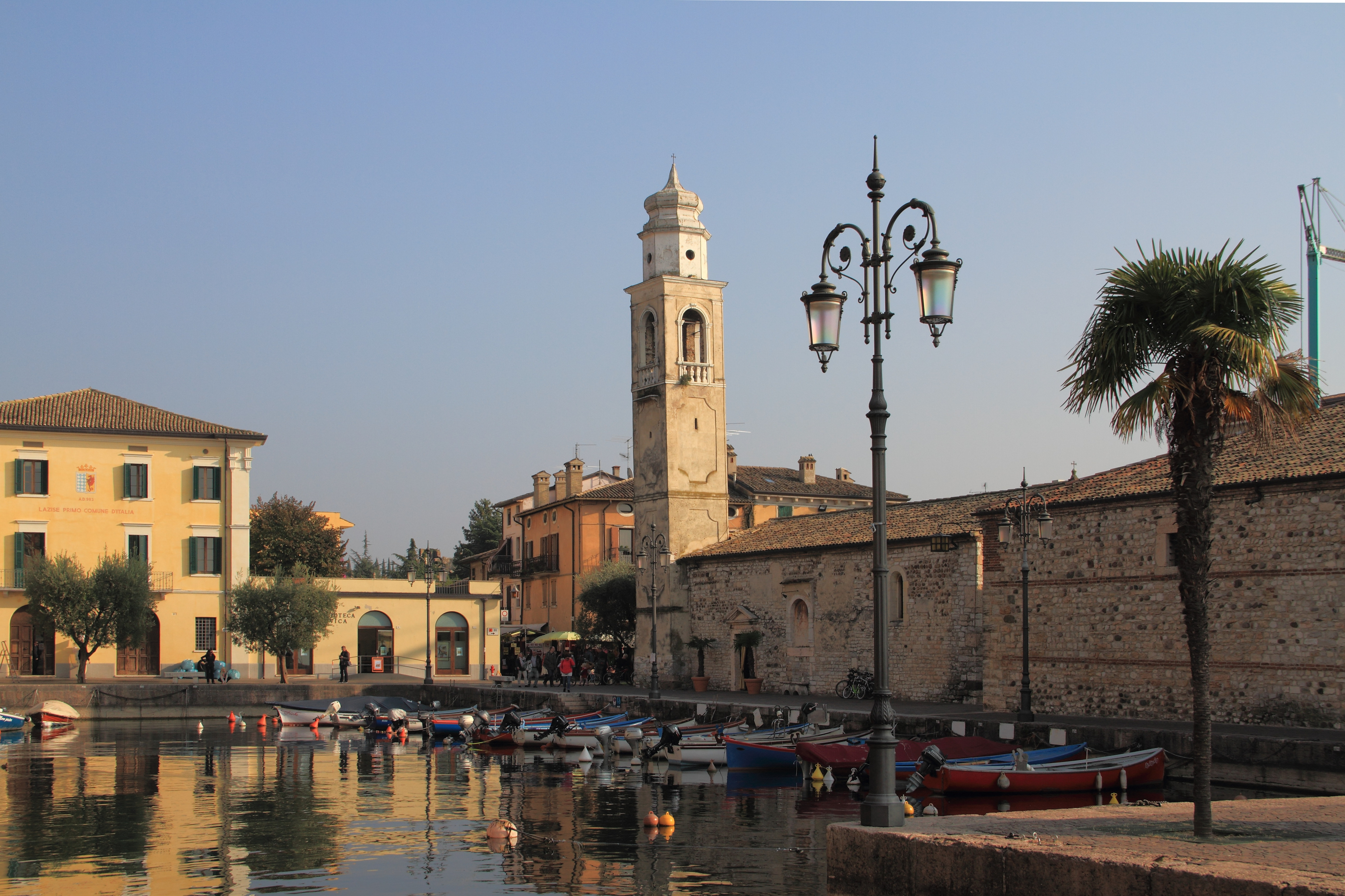 Der Hafen von Lazise mit der Kirche San Nicolò.